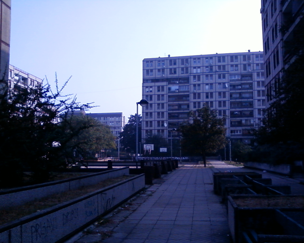 Blok 19a, Beograd, Serbia